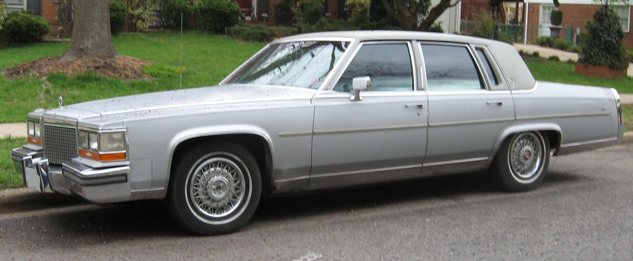 uuu goood looking.